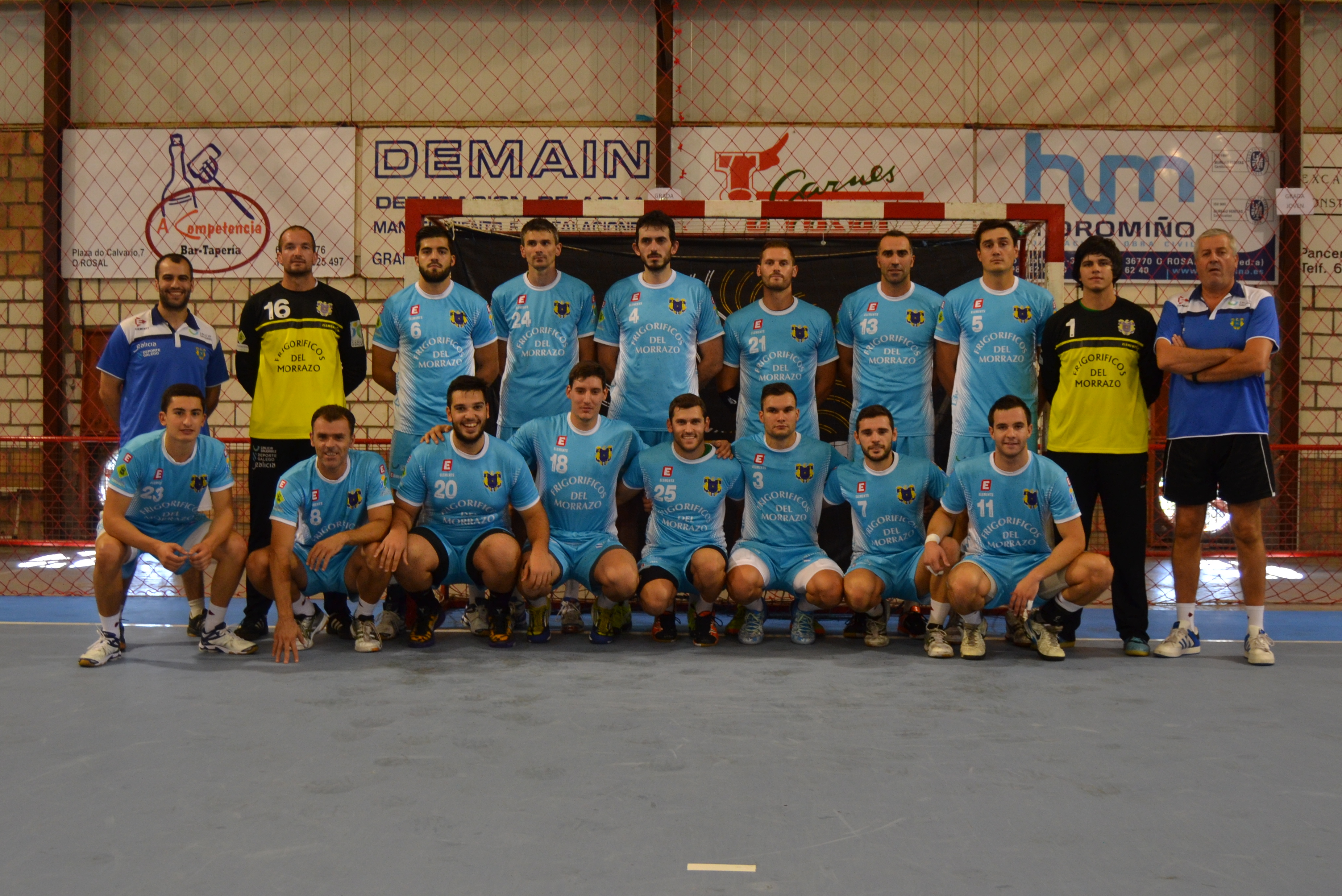 Balonmán Cangas coa segunda equipación nas semifinais da Copa Galicia 2014 contra o Atlético Novás